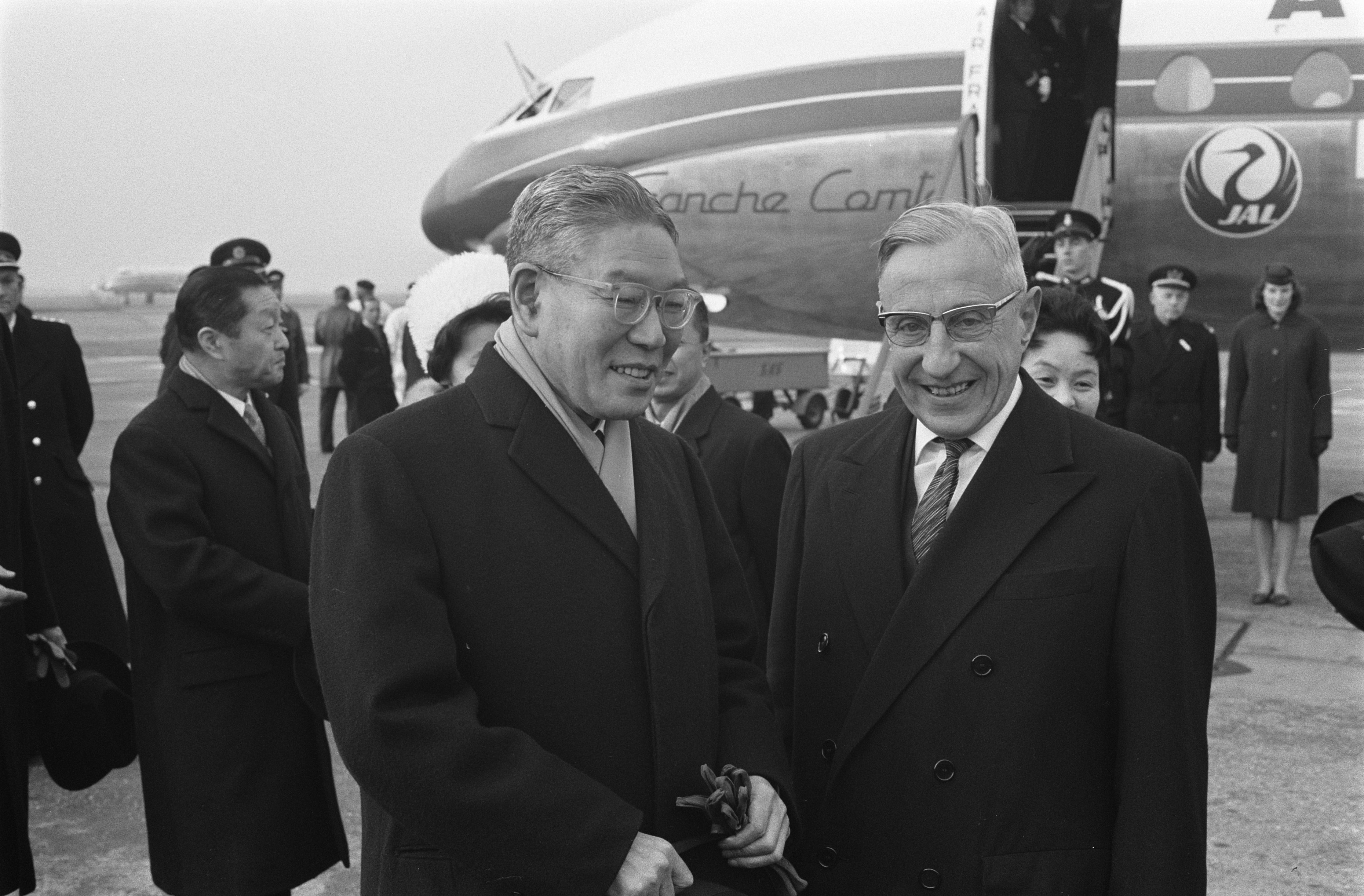 Bezoek Ikeda (Haiyoto), Japanse Minister-Presiden